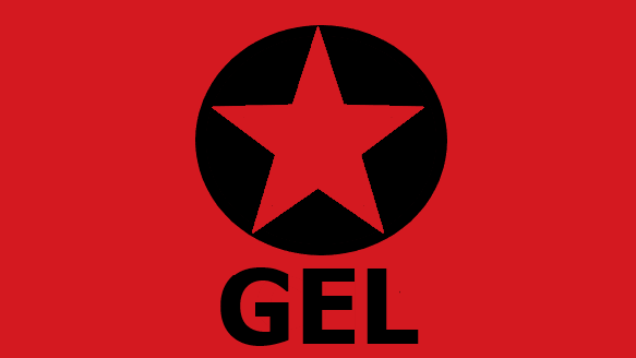 Bandera usada por el grupo Guerrilla del Ejercito Liberador